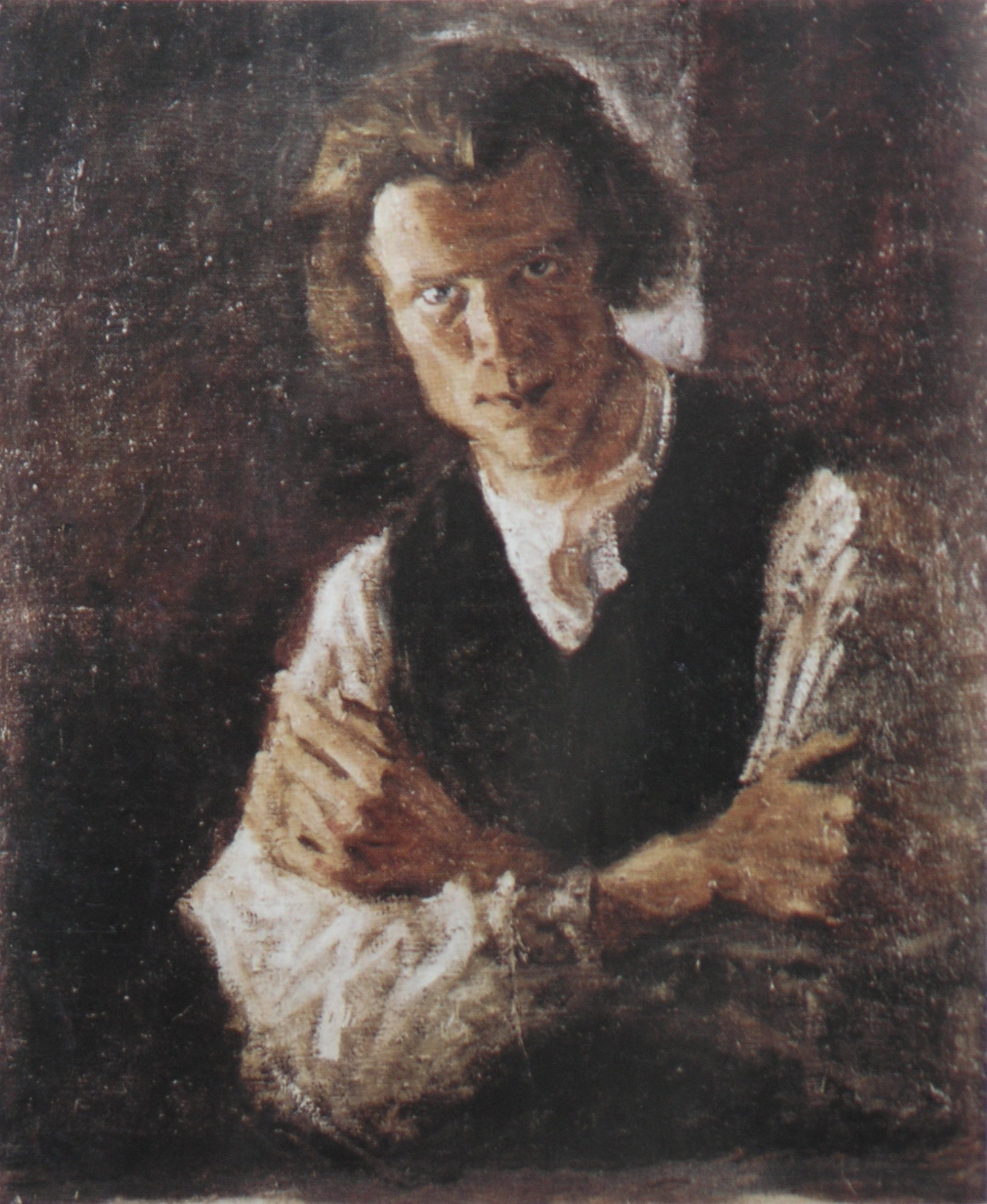 Vlastní podobizna se založenýma rukama